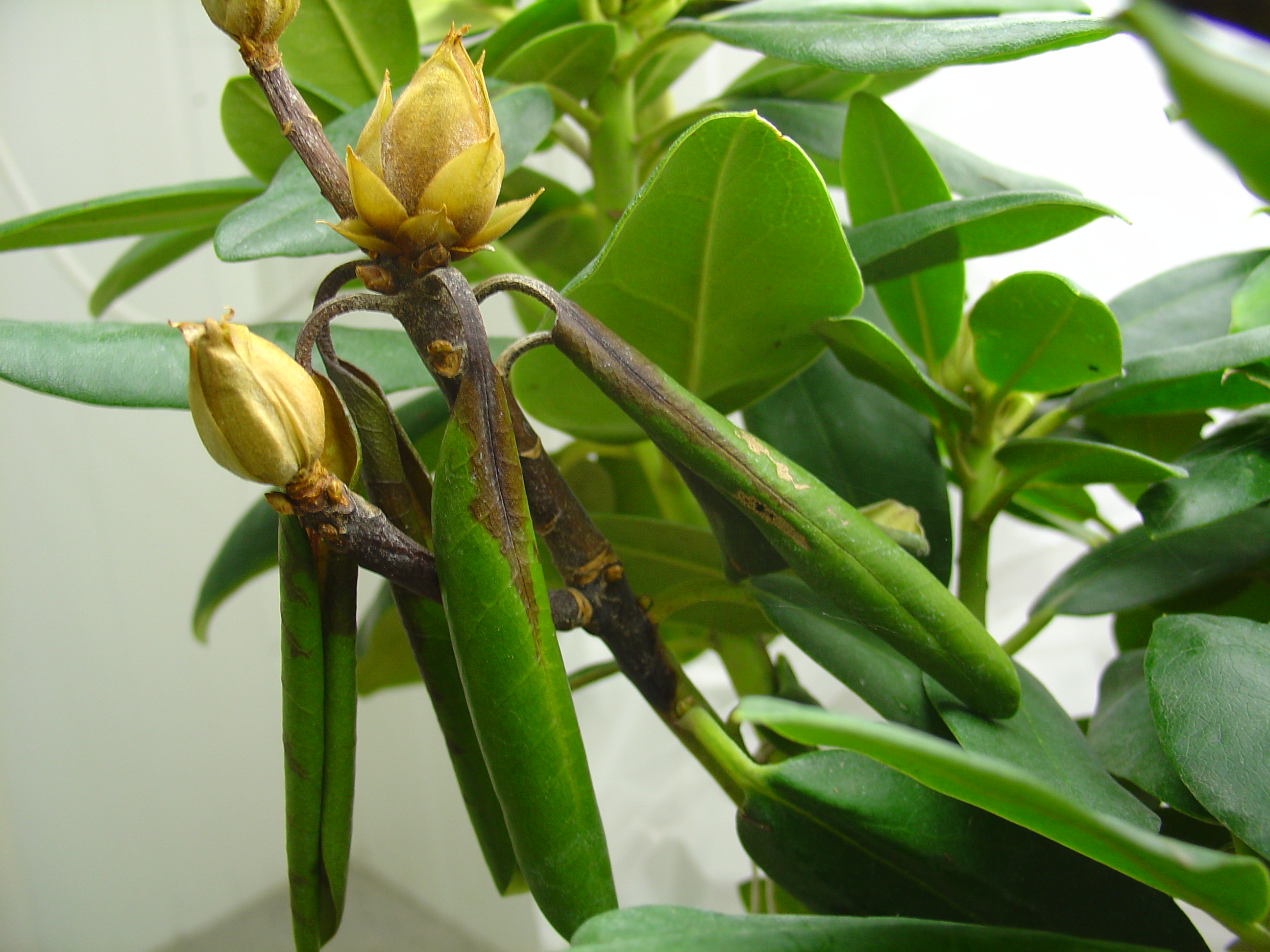 Rhododendron Shoot Blight Phytophthora plurivora Marcela Mrazkova, Karel Cerny southern Moravia, Czech Republic, 2006